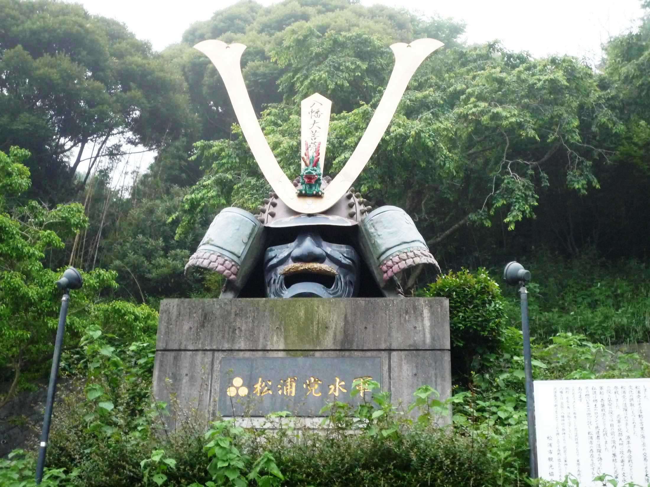 松浦水軍の兜（調川道路公園）